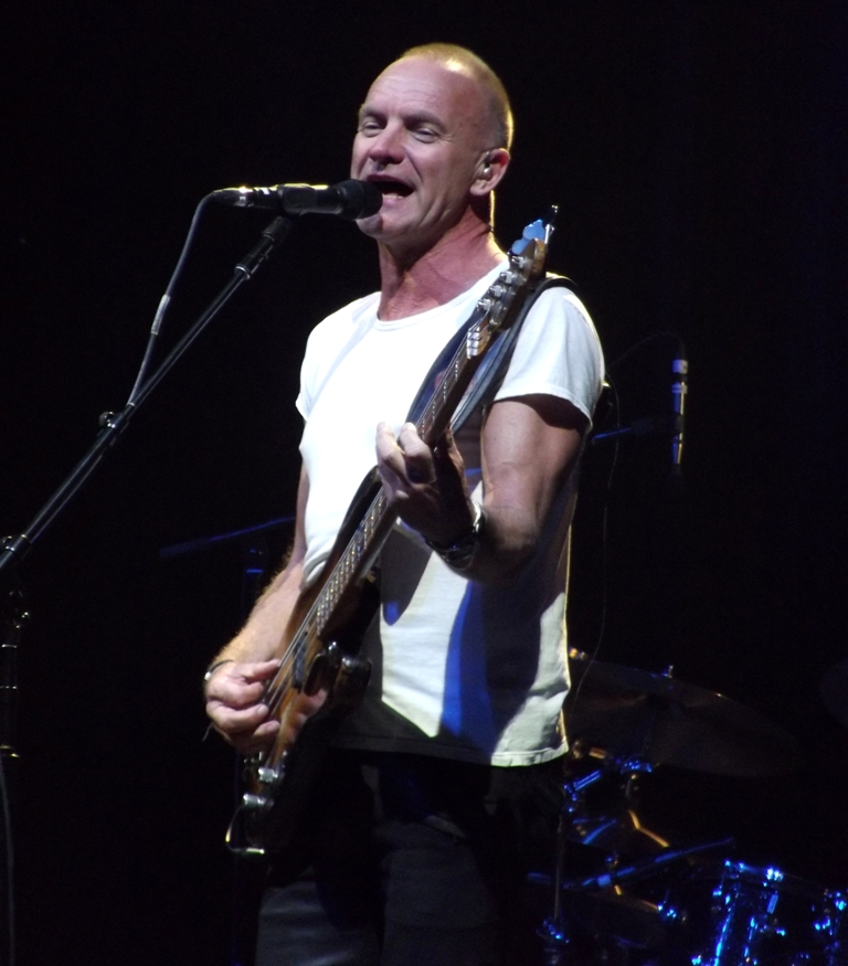 Zdjęcie zrobione podczas drugiego dnia Life Festivalu 2013 w Oświęcimiu.